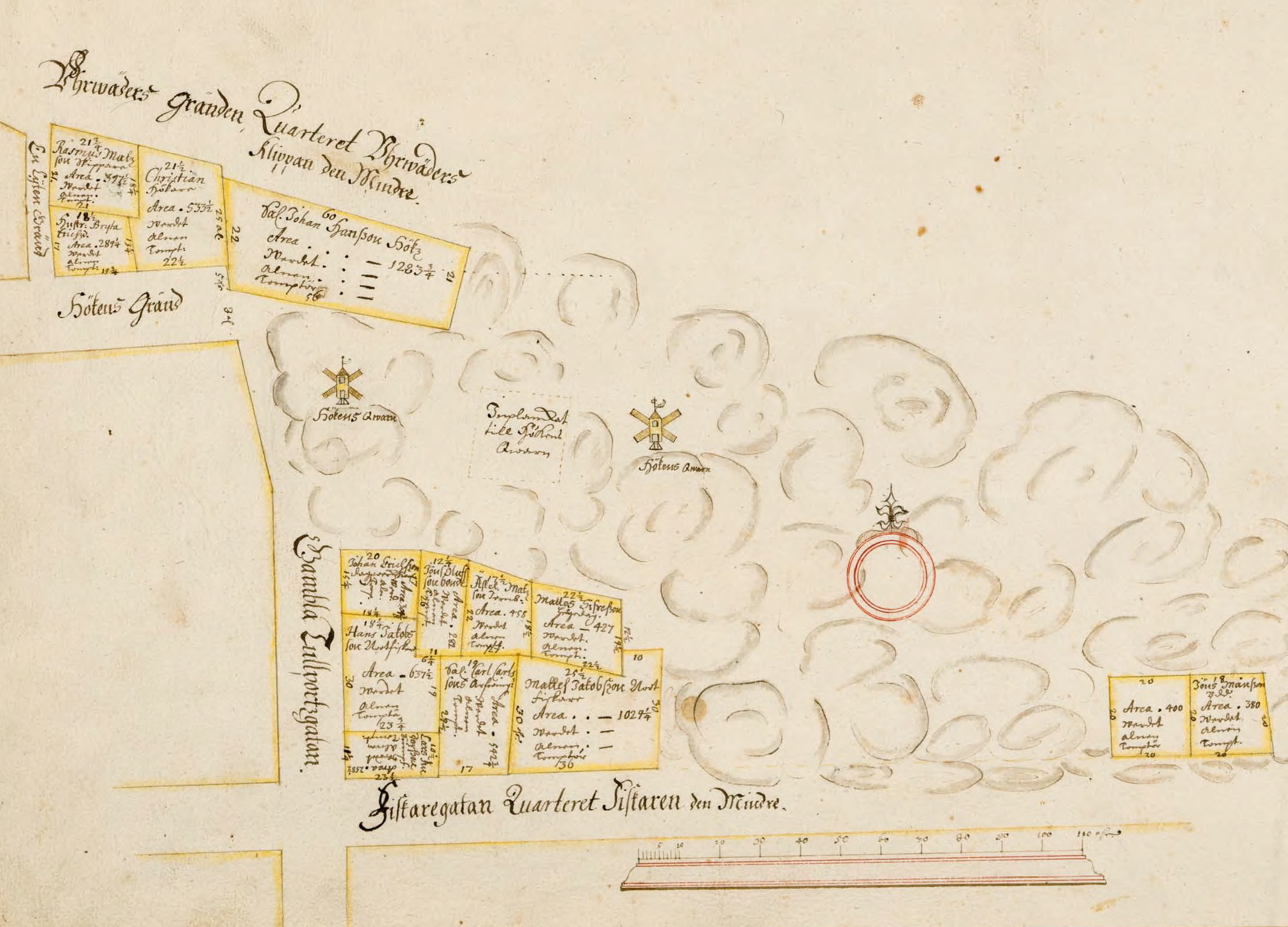 Hökens kvarnar enligt Johan Holms tomtbok